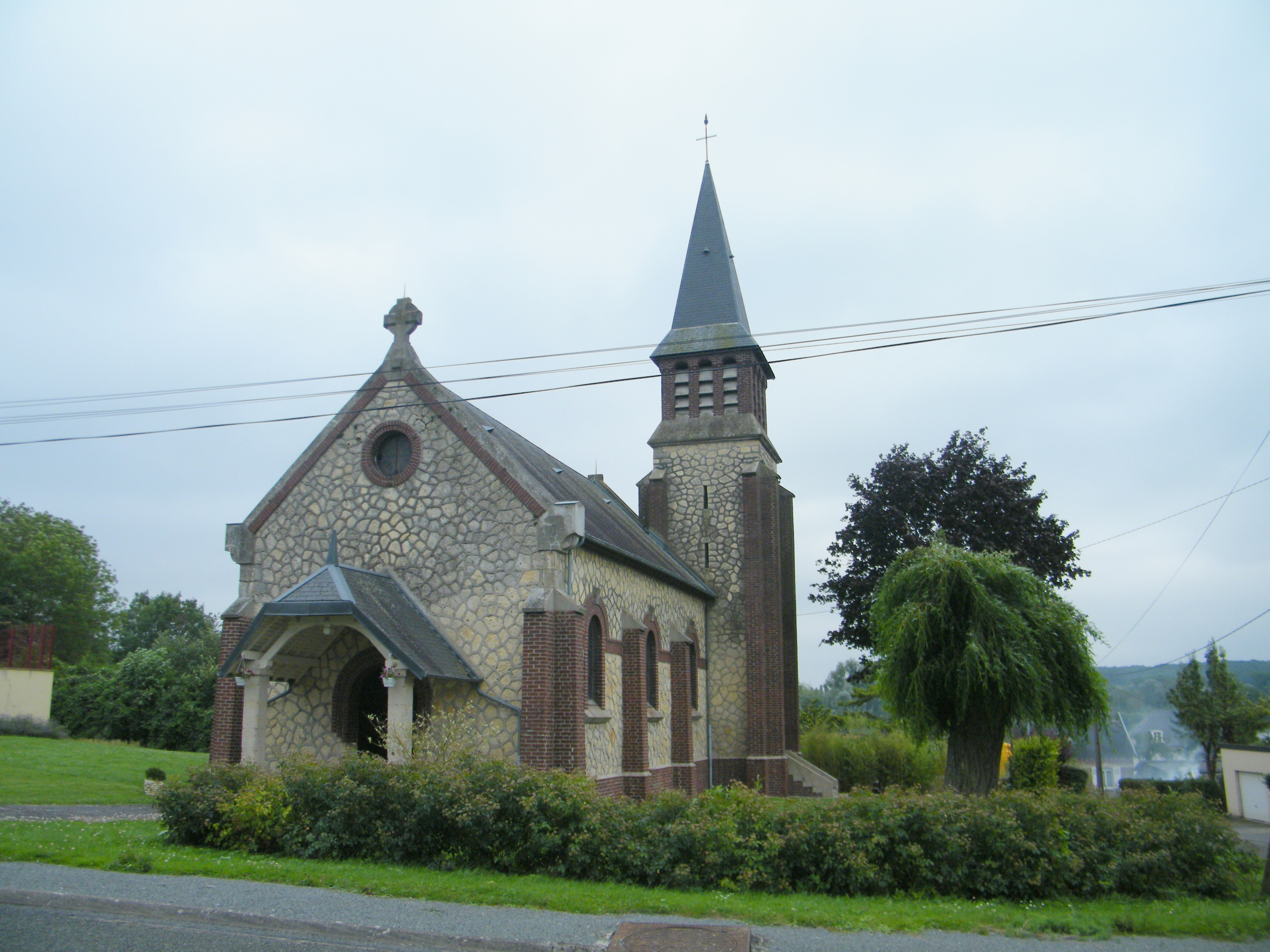 Eglise.